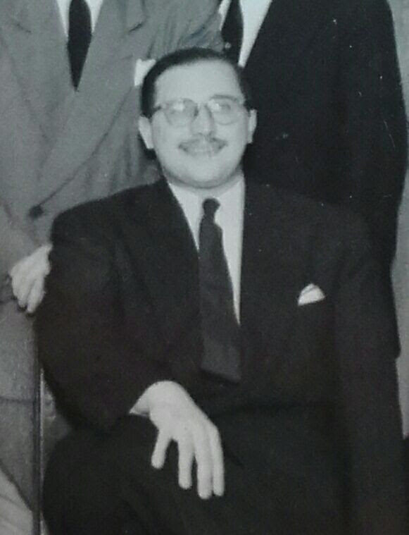 El compositor en el compromiso del compositor y amigo José Botirolli